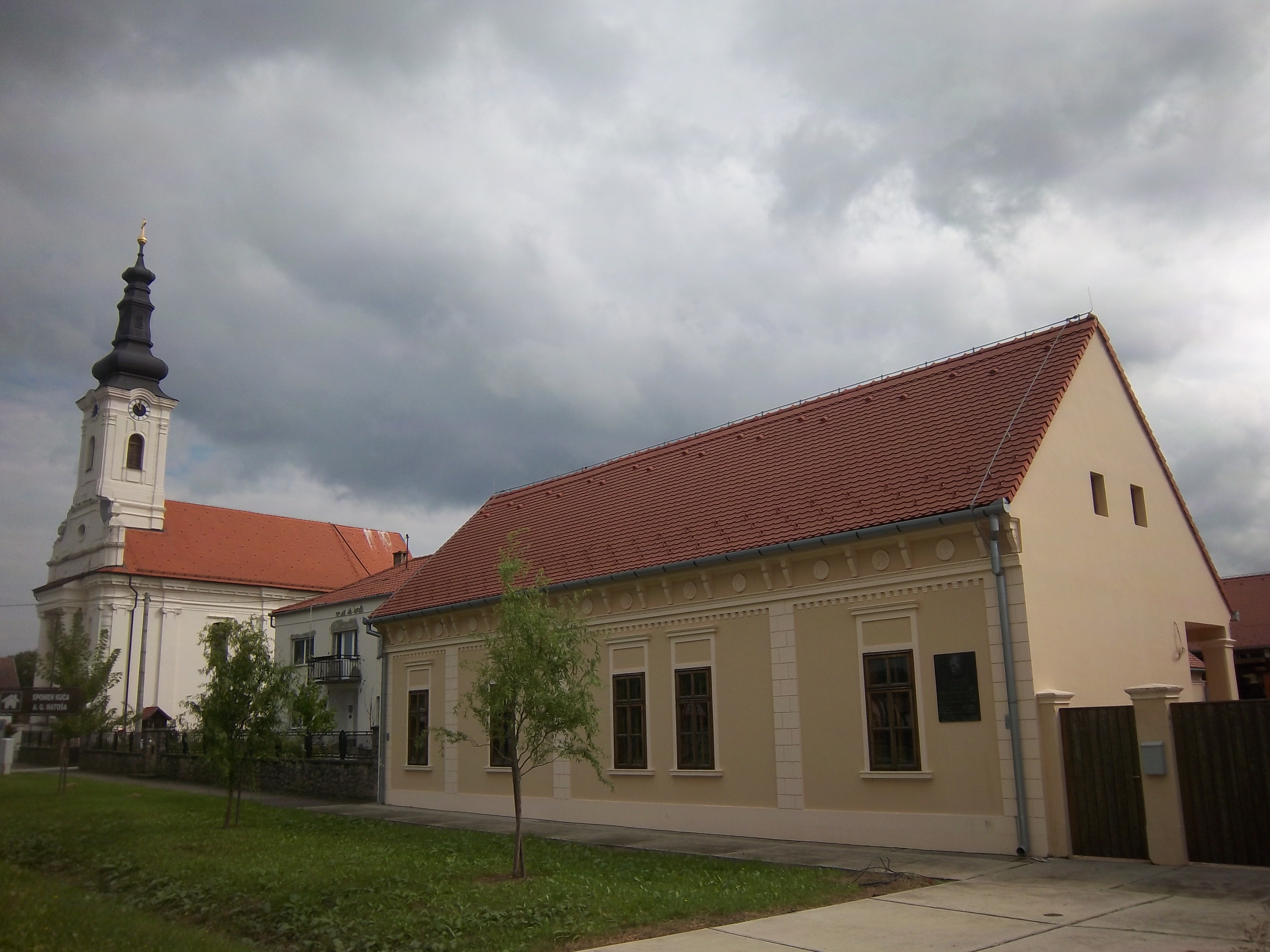 Српски (ћирилица): Родна кућа Антуна Густава Матоша (Република Хрватска)